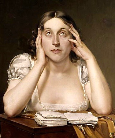 Constant-Joseph Desbordes (1761–1827): Die Dichterin Marceline Desbordes-Valmore (1786–1859), eine Nichte des Künstlers. Musée de la Chartreuse de Douai. Photo (C) RMN-Grand Palais / Agence Bulloz.